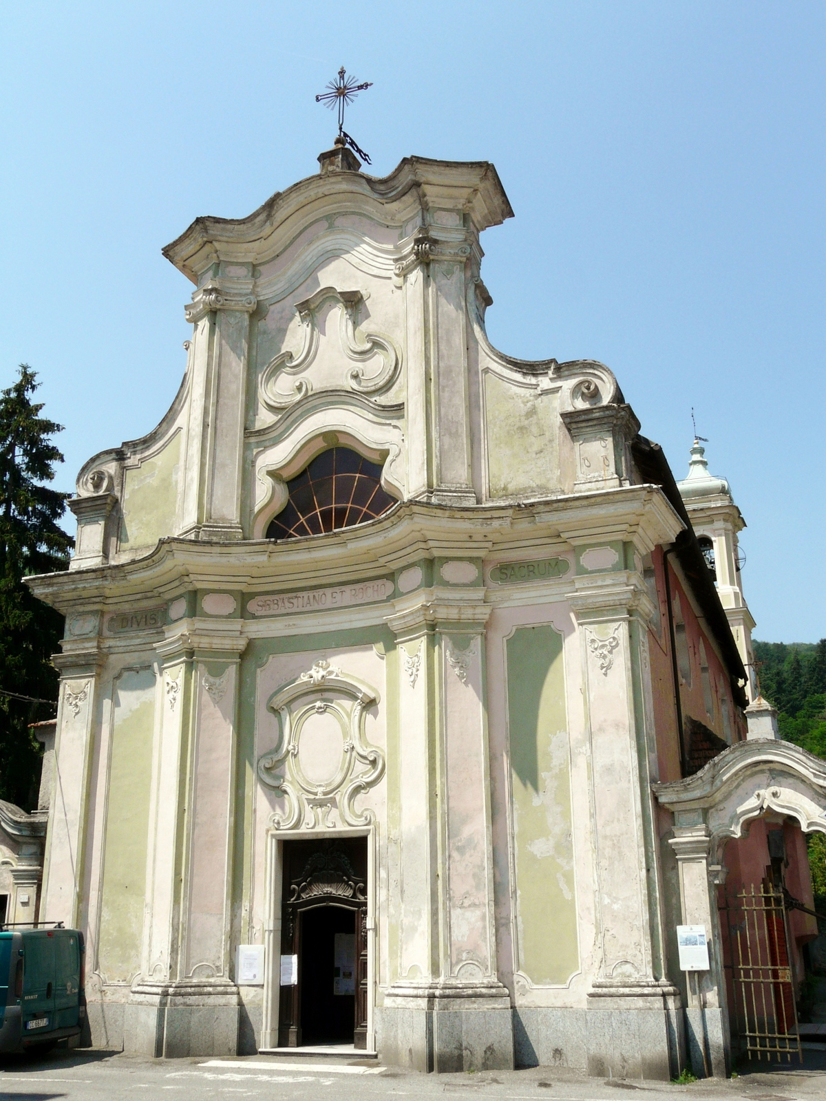 Oratorio dei Santi Sebastiano e Rocco, Campo Ligure, Liguria, Italia